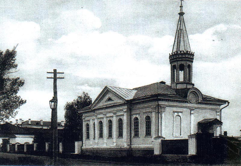 Исторический вид лютеранской церкви в Омске